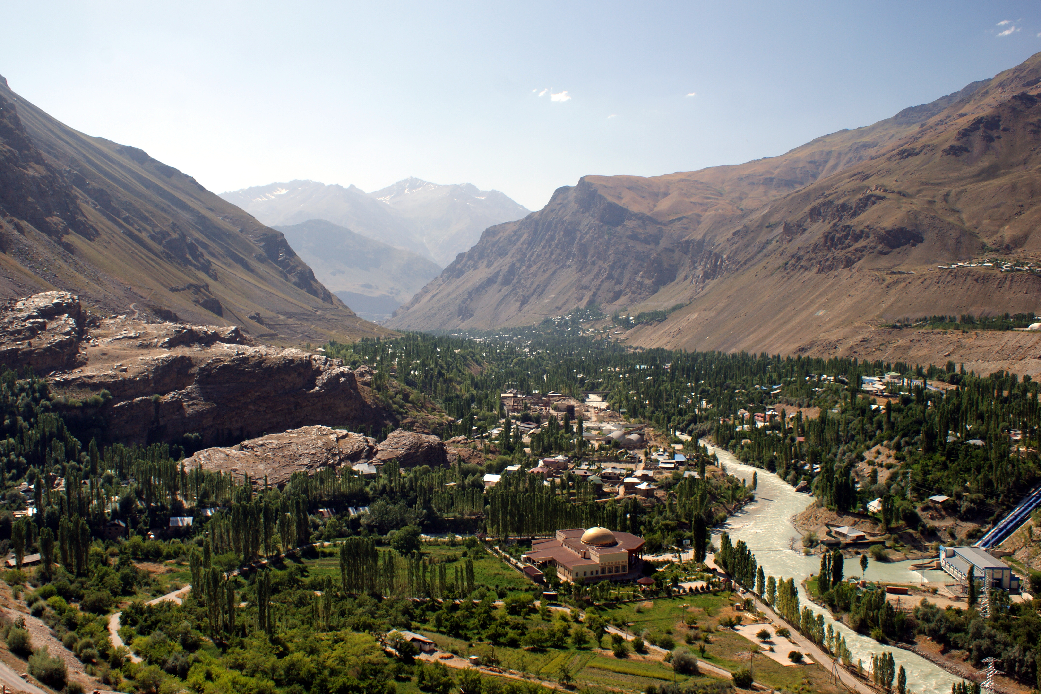 Sicht auf Khorog vom botanischen Garten aus